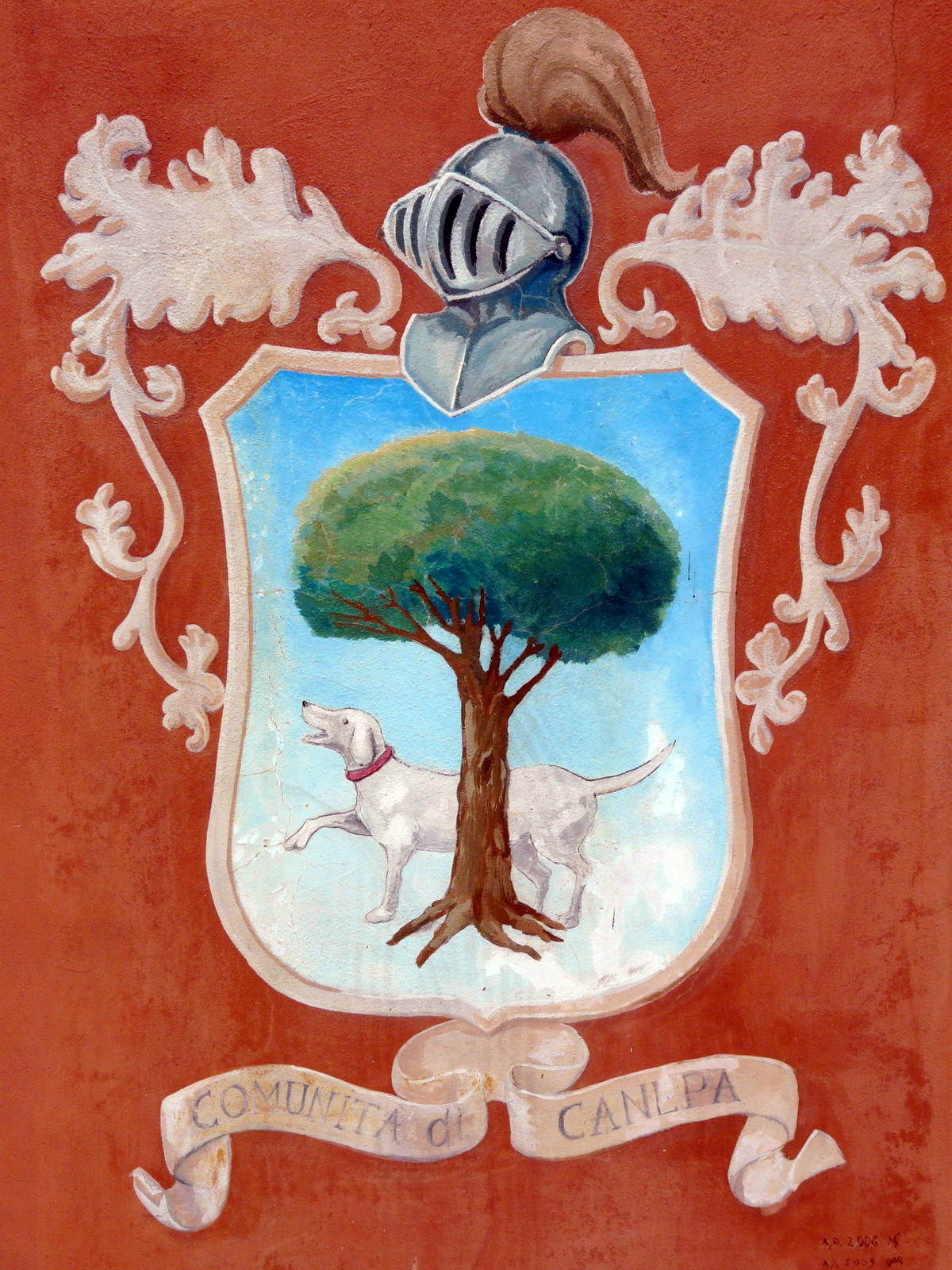 Raffigurazione dello stemma della comunità frazionale di Canepa, Sori, Liguria, Italia